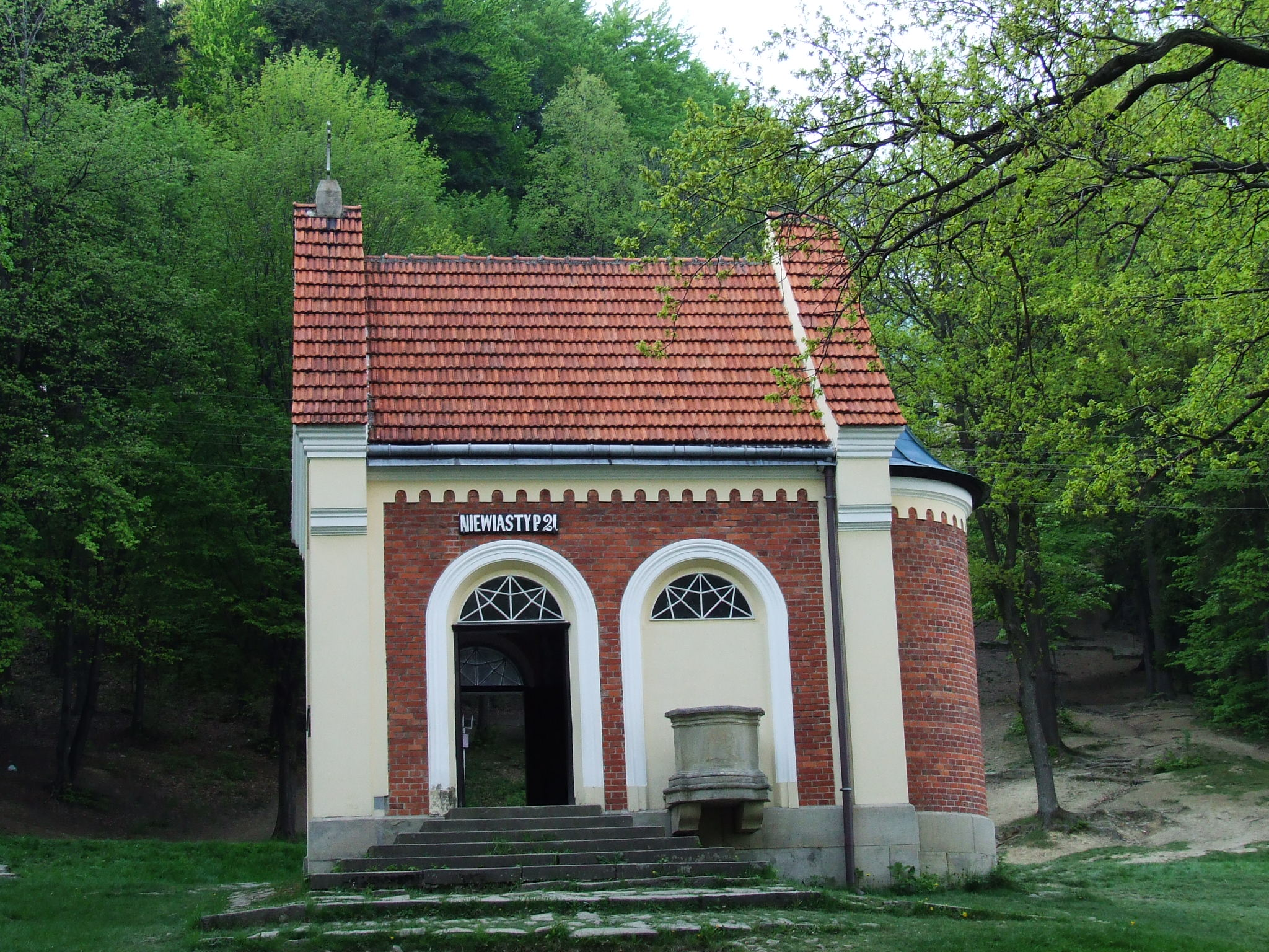 The station of Cross - Crying women chapel/Stacja Drogi Krzyżowej - kaplica płaczących niewiast